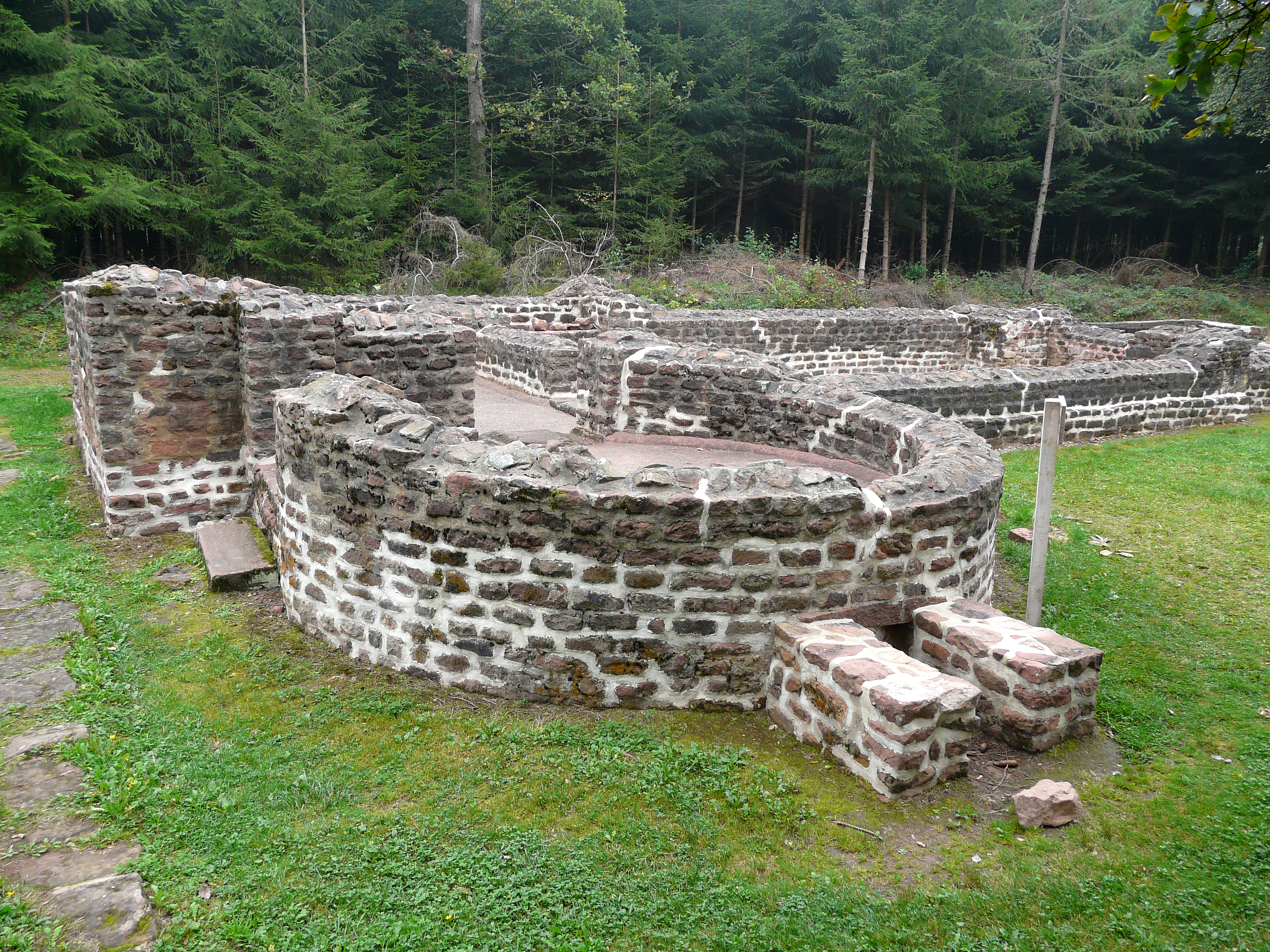 Thermen des Kastells Würzberg am Odenwaldlimes; Blick über das Sudatorium auf den Thermenkomplex